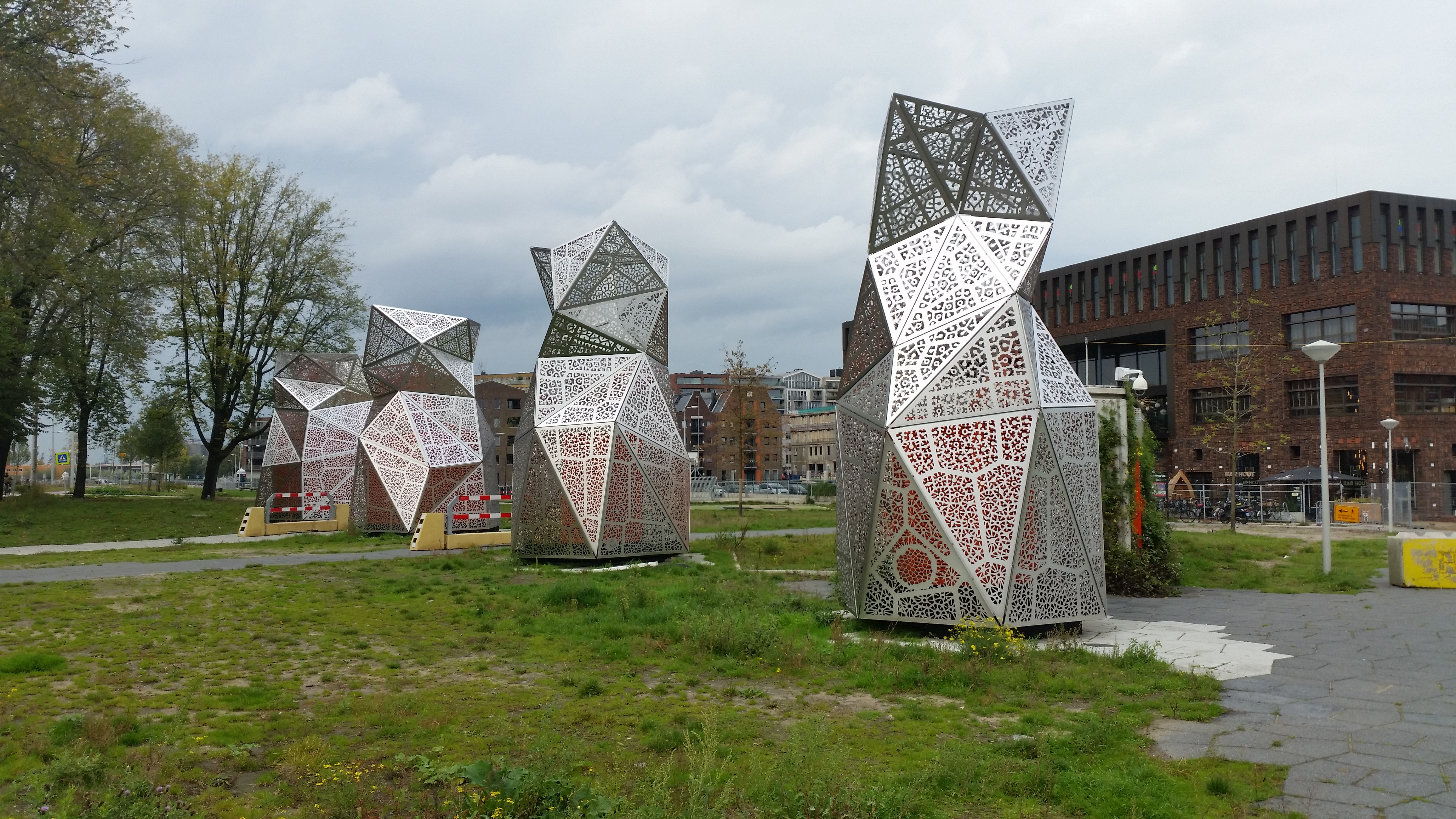 Ventilatietorens van roestvast staal van de Spaarndammertunnel in Amsterdam-West. Kunstenaar is Frans Tjepkema